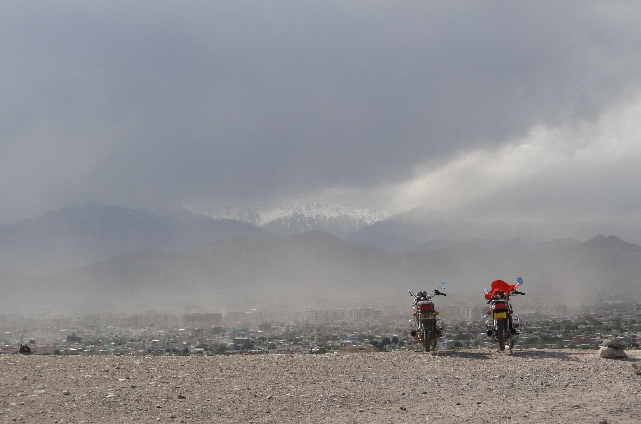 overlooking Kabul